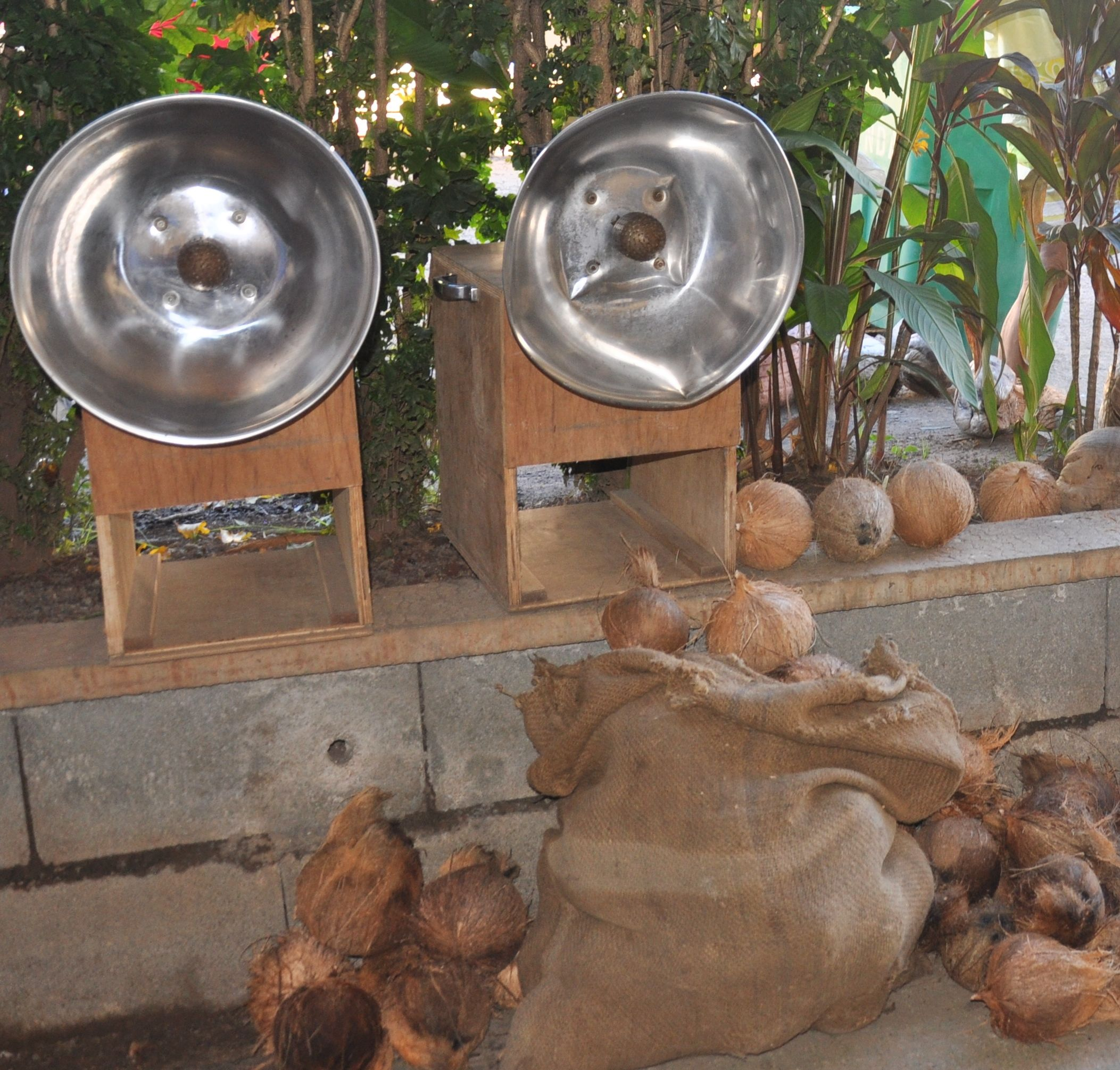 rape à coco électrique